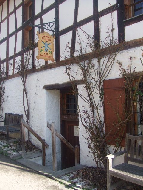 Gerber-Museum zur Lohmühle, Leustetten, Gemeinde Frickingen, Bodenseekreis